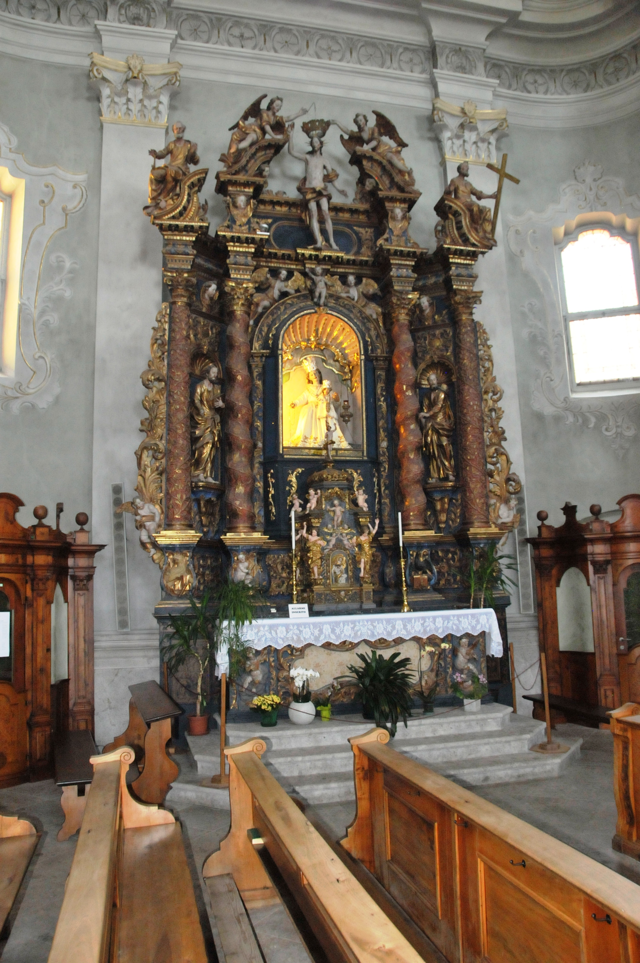 Cortina d'Ampezzo: Santi Filippo e Giacomo, Seitenaltar "Muttergottes des Rosenkranzes" von Andrea Brustolon